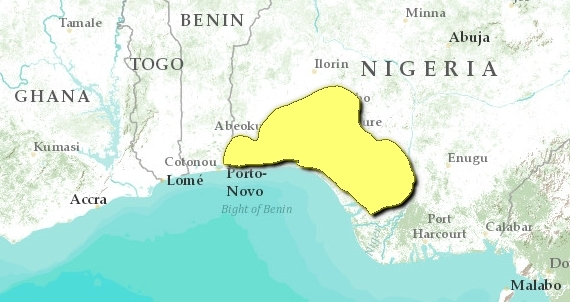 Mappa Ecoregione AT0123 - Foreste di pianura della Nigeria